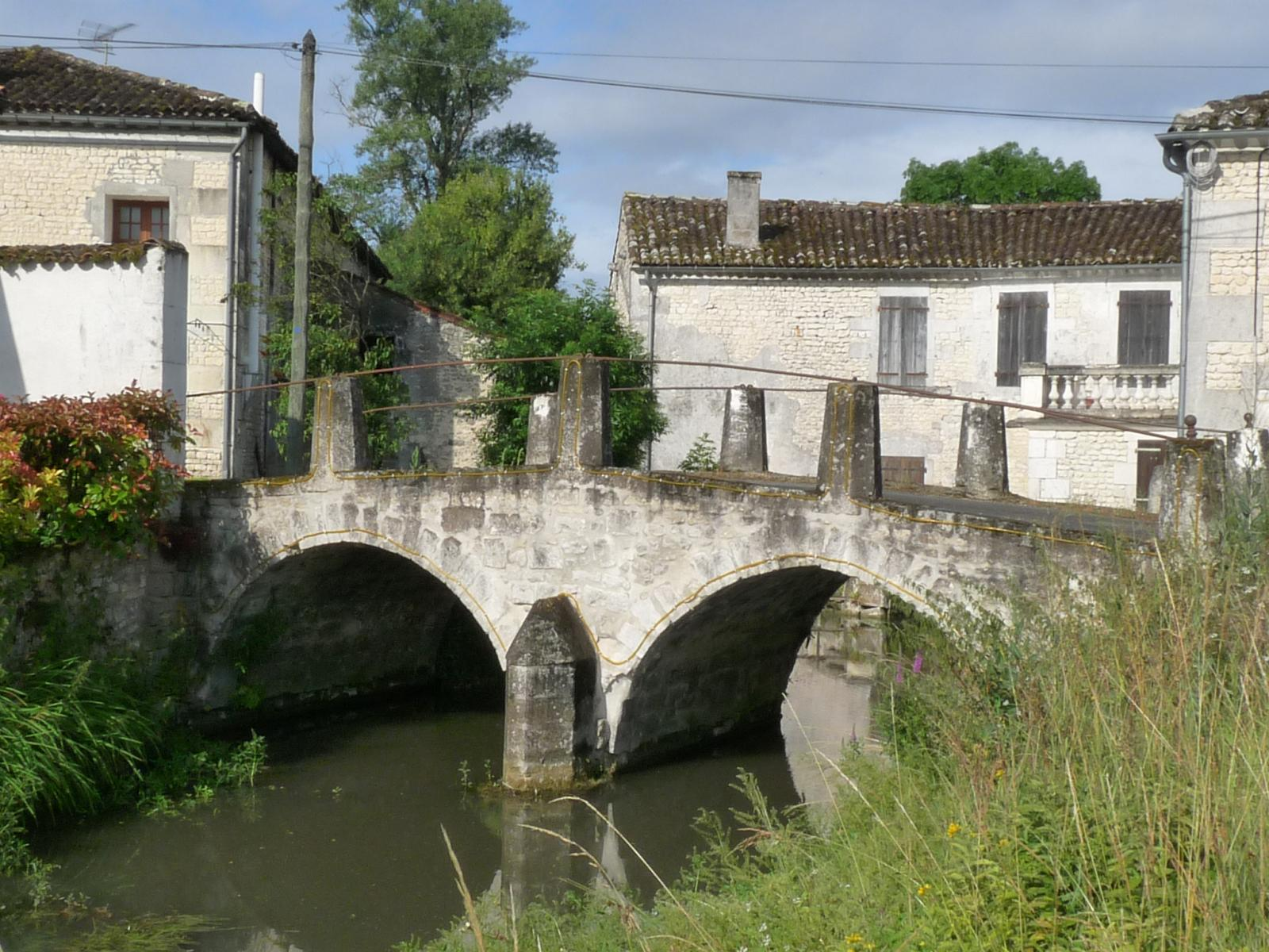 Pont du moulin et de la chapelle des Templiers, Angles, Salles-d'Angles, Charente, France